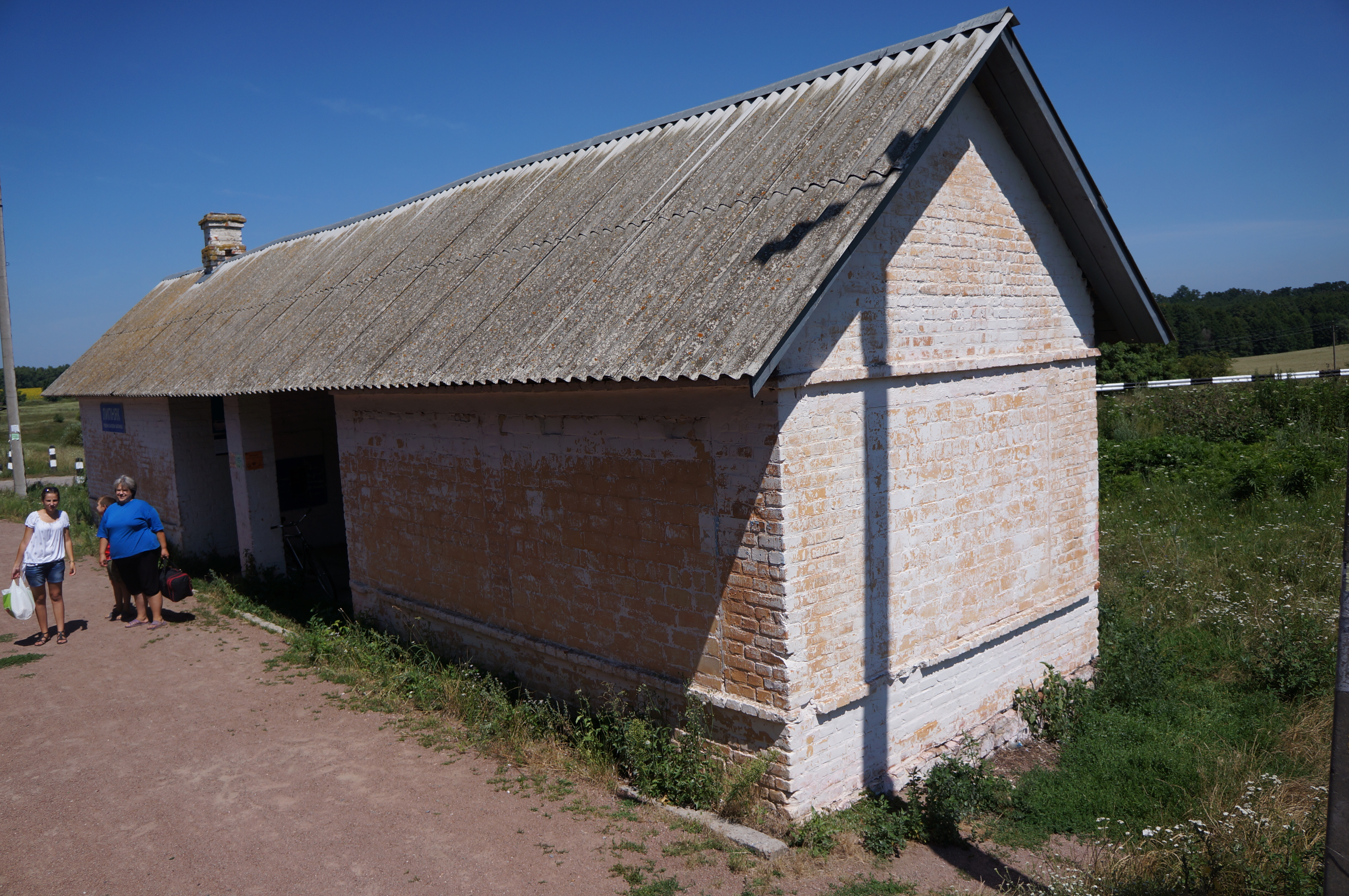 Залізнична платформа Липняк